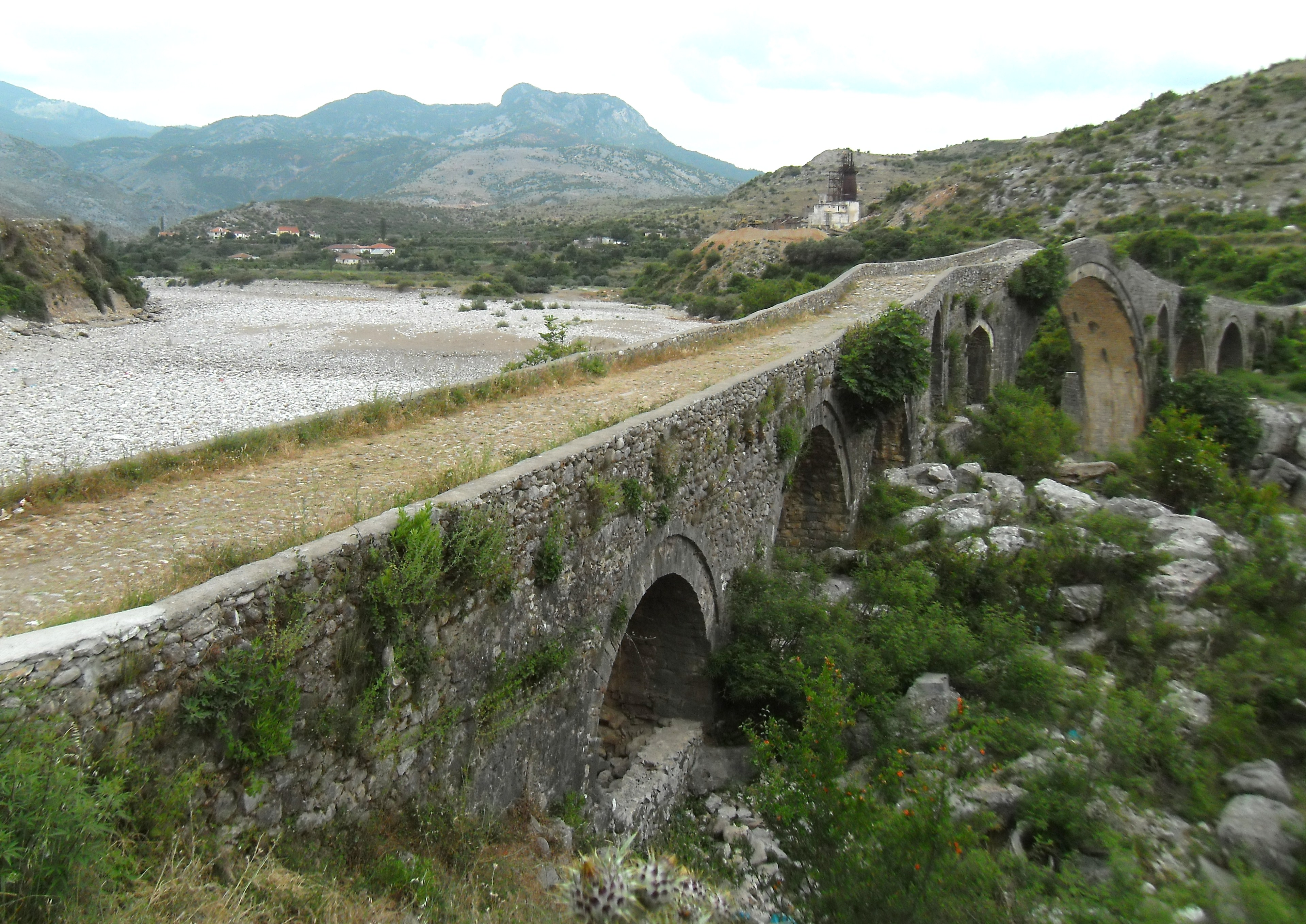 Mesi-Brücke bei Shkodra